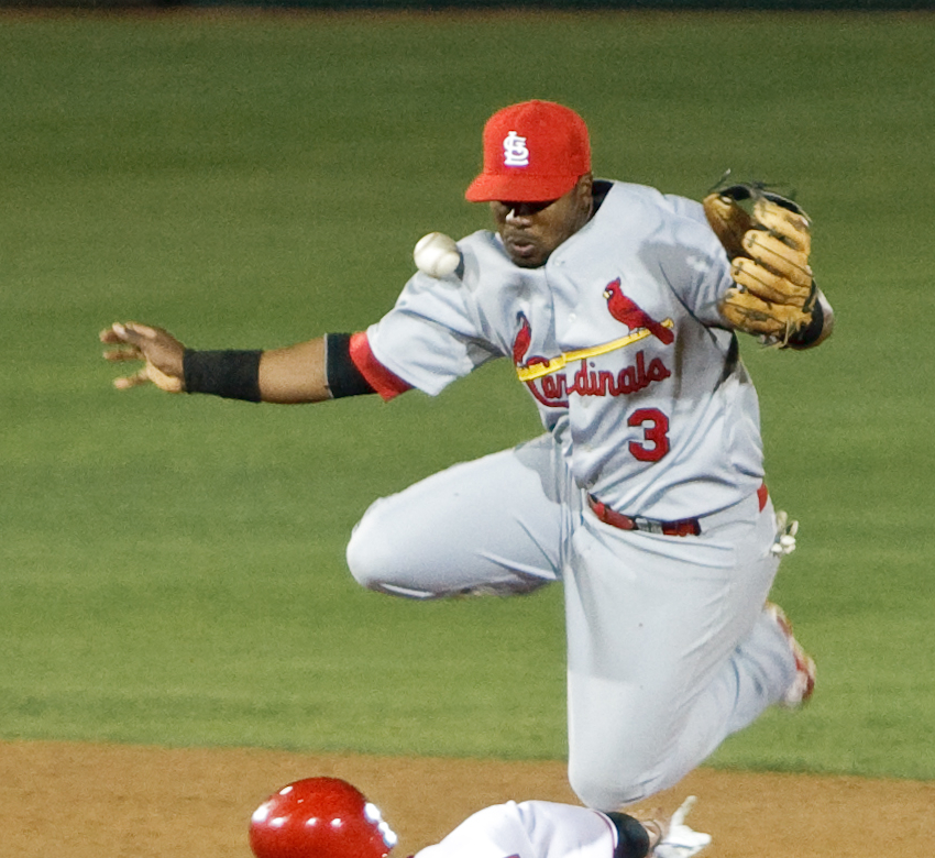 Rubén Gotay